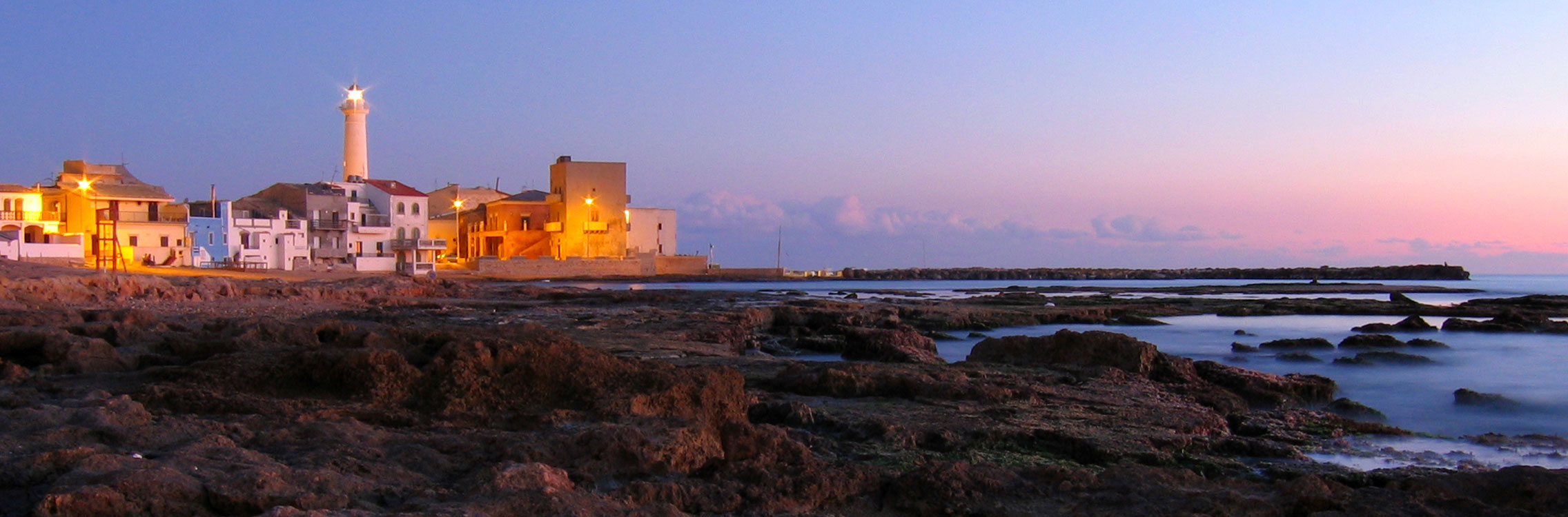 Punta Secca beacon and village skyline at sunset. Author is Alessandro Zocco which has kindly agreed to share under GDFL license. Photo was taken by him on Dec 26th, 2005. Punta Secca: faro e profilo del villaggio al crepuscolo. L'autore è Alessandro Zocco. La foto è stata scattata il 26 dicembre 2005. Subito sotto il faro a destra è visibile la "casa del commissario Montalbano", utilizzata per le scene del film.